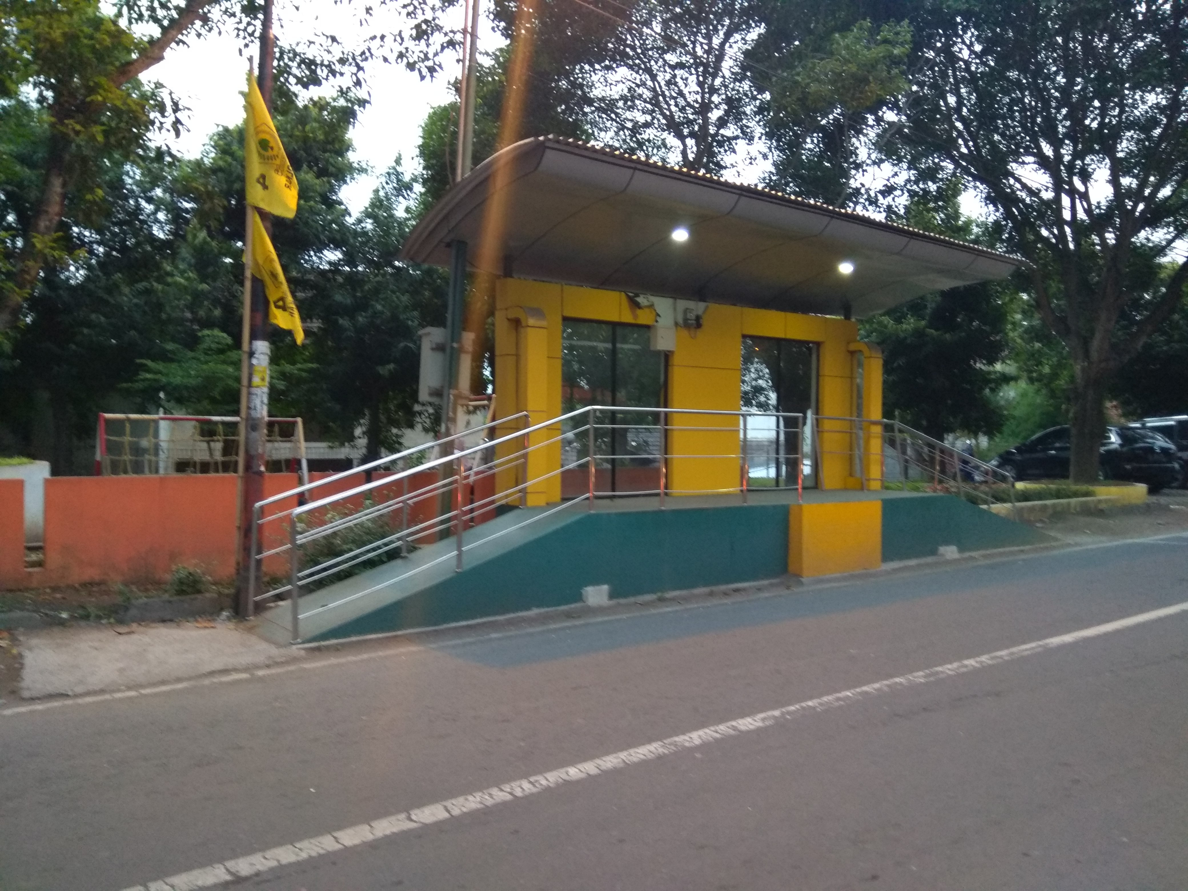 Halte Transjogja Taman Karang